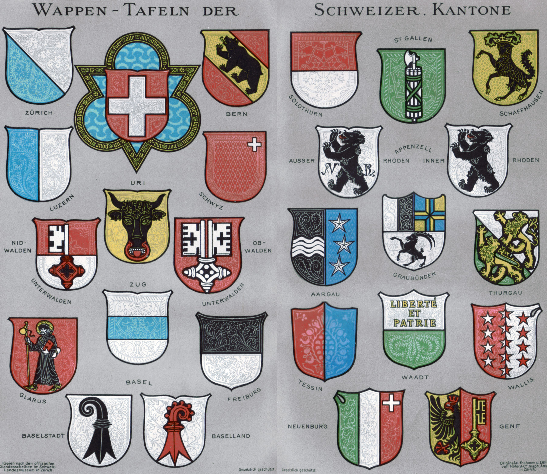 Die Wappen-Tafeln der Schweizer Kantone 1905. Die Standesscheiben der Kantone von 1896 im Landesmuseum Zürich dienten als Vorlage. Hier erschien erstmals das moderne Wappen des Kantons Graubünden in der Variante von Jospeh Zemp (Farben im Schild des Grauen Bundes gegenüber heute vertauscht). Die Aufzählung zeigt die XXII Kantone inklusive der sechs Halbkantone. Es fehlt der Kanton Jura.